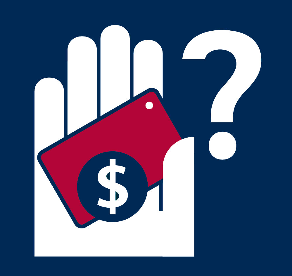 中文（香港）: 港鐵客務中心標誌。